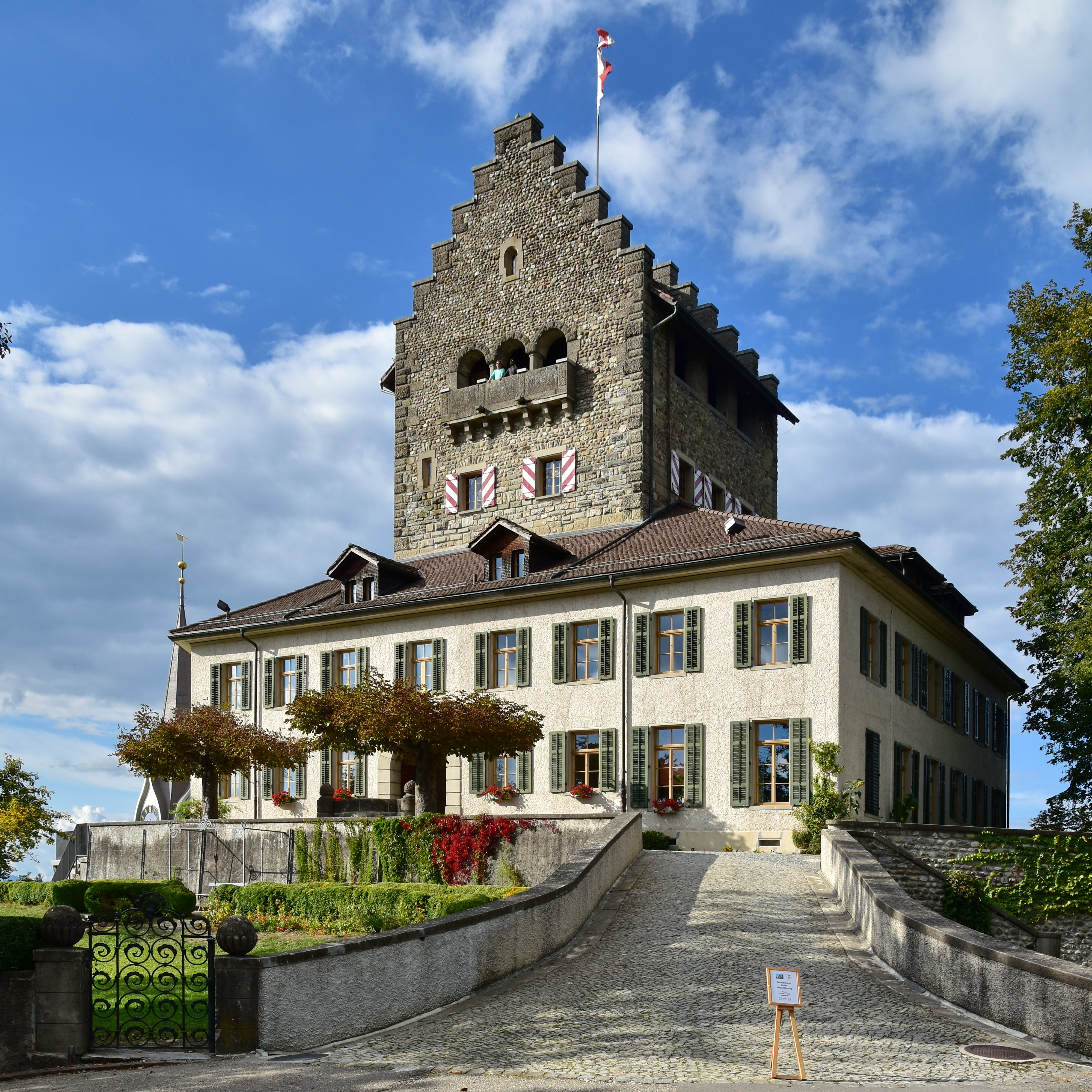 Schloss (Castle) in Uster (Switzerland)